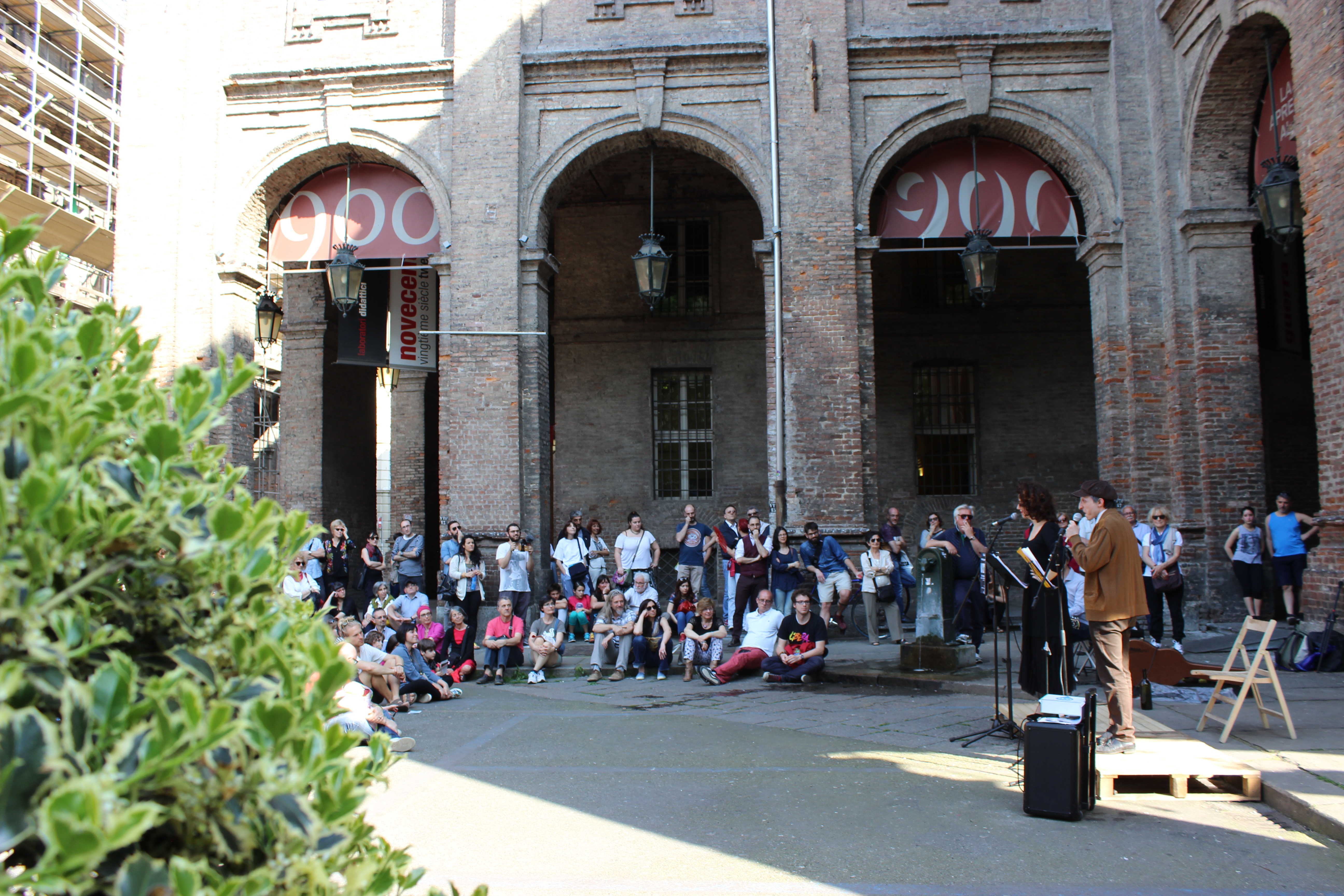 Evento del Polo del '900 che ha interessato il piazzale circostante tra i due palazzi.